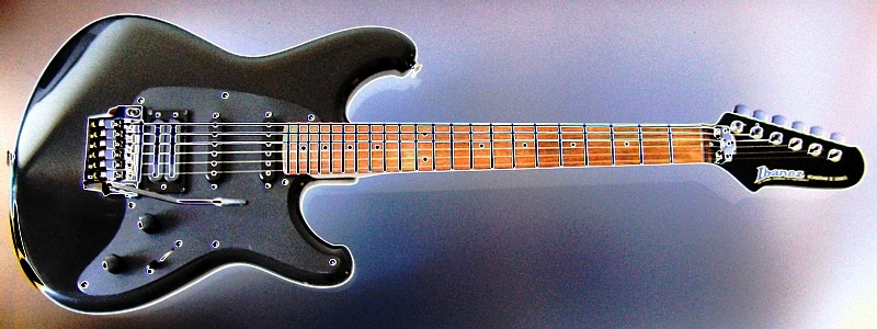 Ibanez Roadstar II Series RS 440